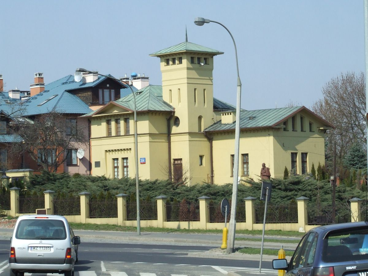 Żółta Karczma, Warszawa Mokotów, Służew